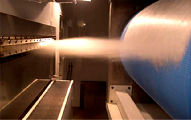 Production of melt-blown fibers.